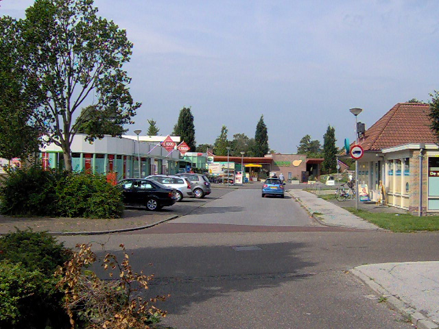 Winkelcentrum Oosterhaar, Haren, Nederland